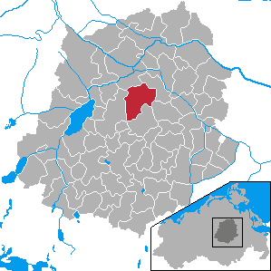 Beggerow, Landkreis Demmin, Mecklenburg-Vorpommern